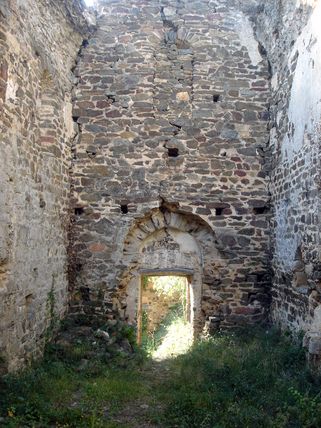 Esglèsia de Sant Mateu de Vall-llobrega (Girona, Catalunya, Espanya) - Vista interior; direcció porta principal